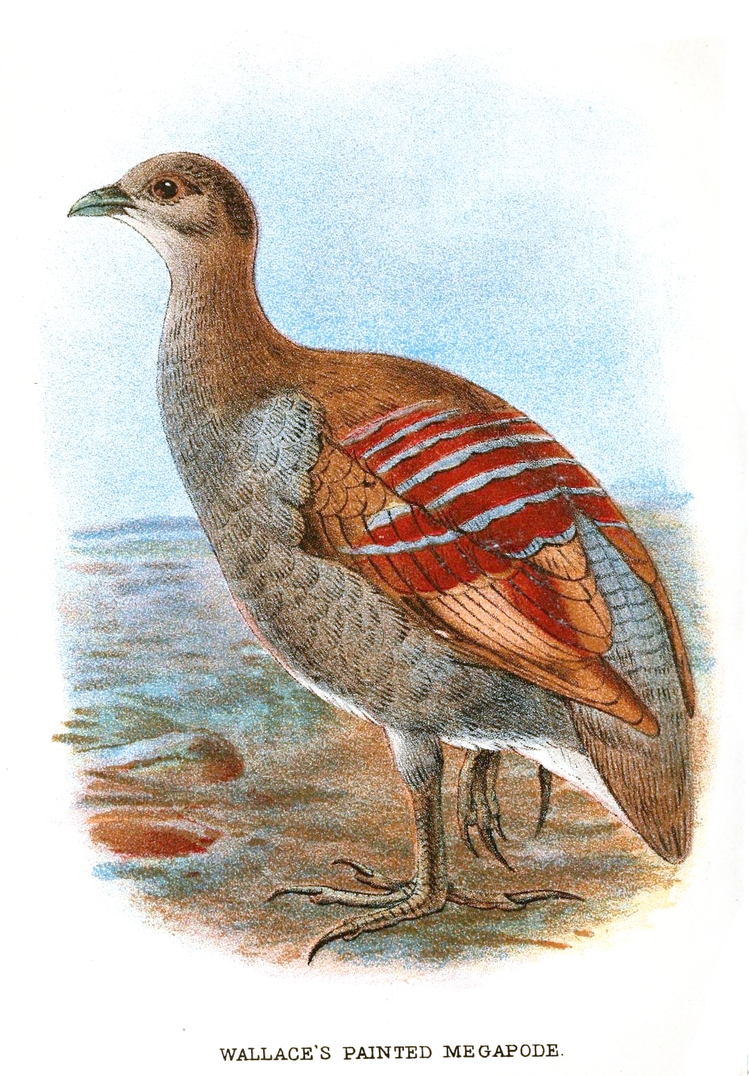 Eulipoa wallacei